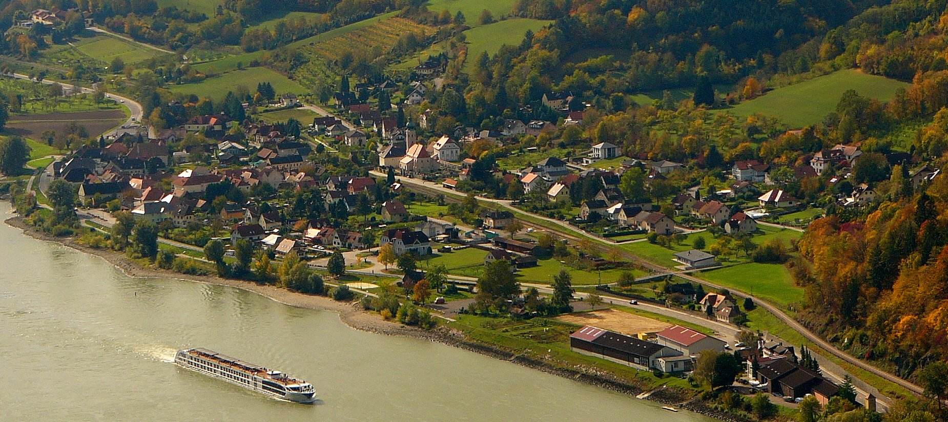 Markt Aggsbach von der Ruine Aggstein aus gesehen.